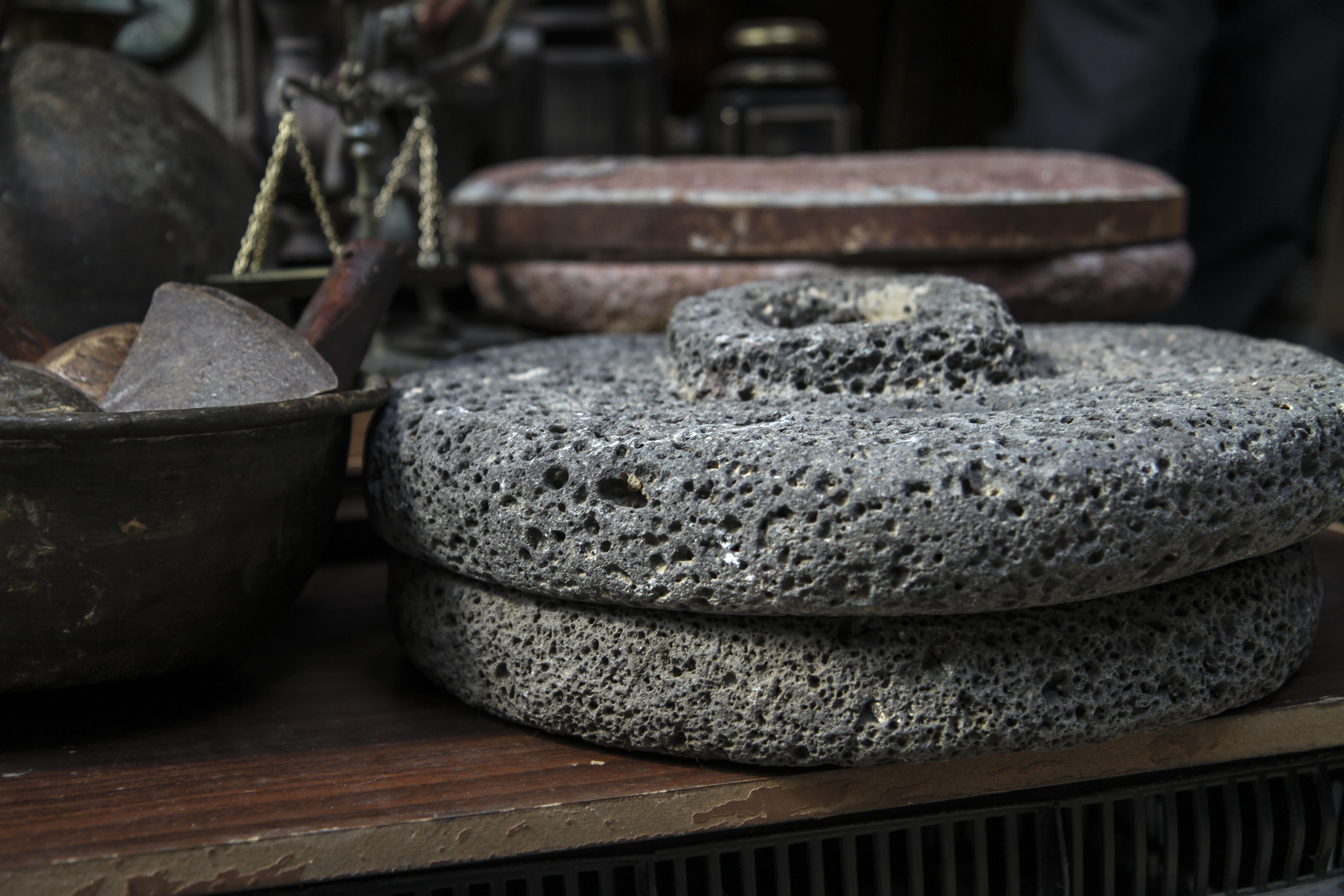 אבן רחיים